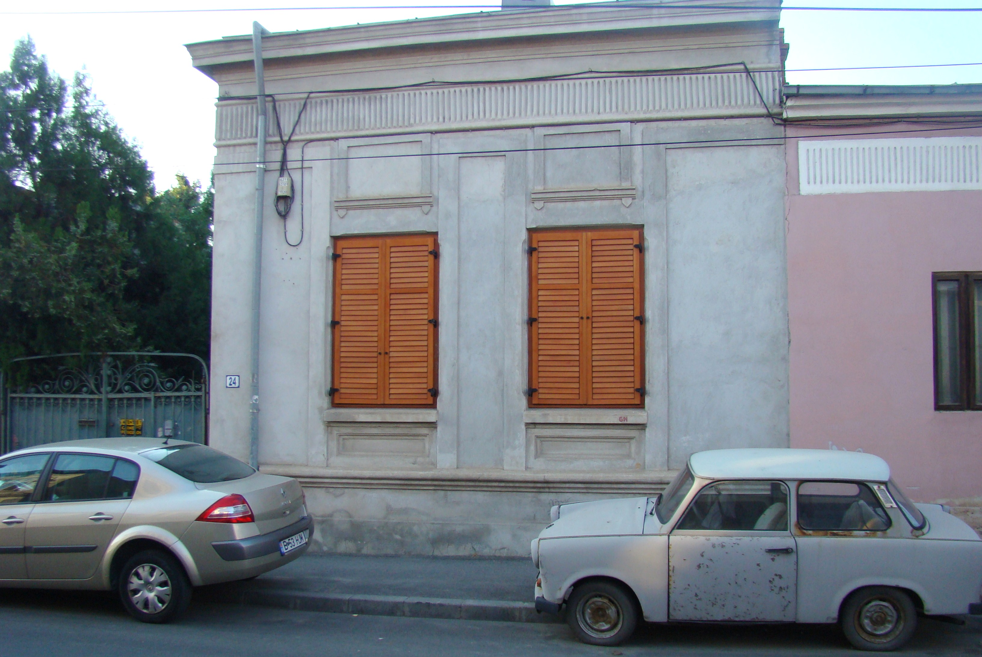 Clădire monument istoric, str. Mircea Vulcănescu, nr.24